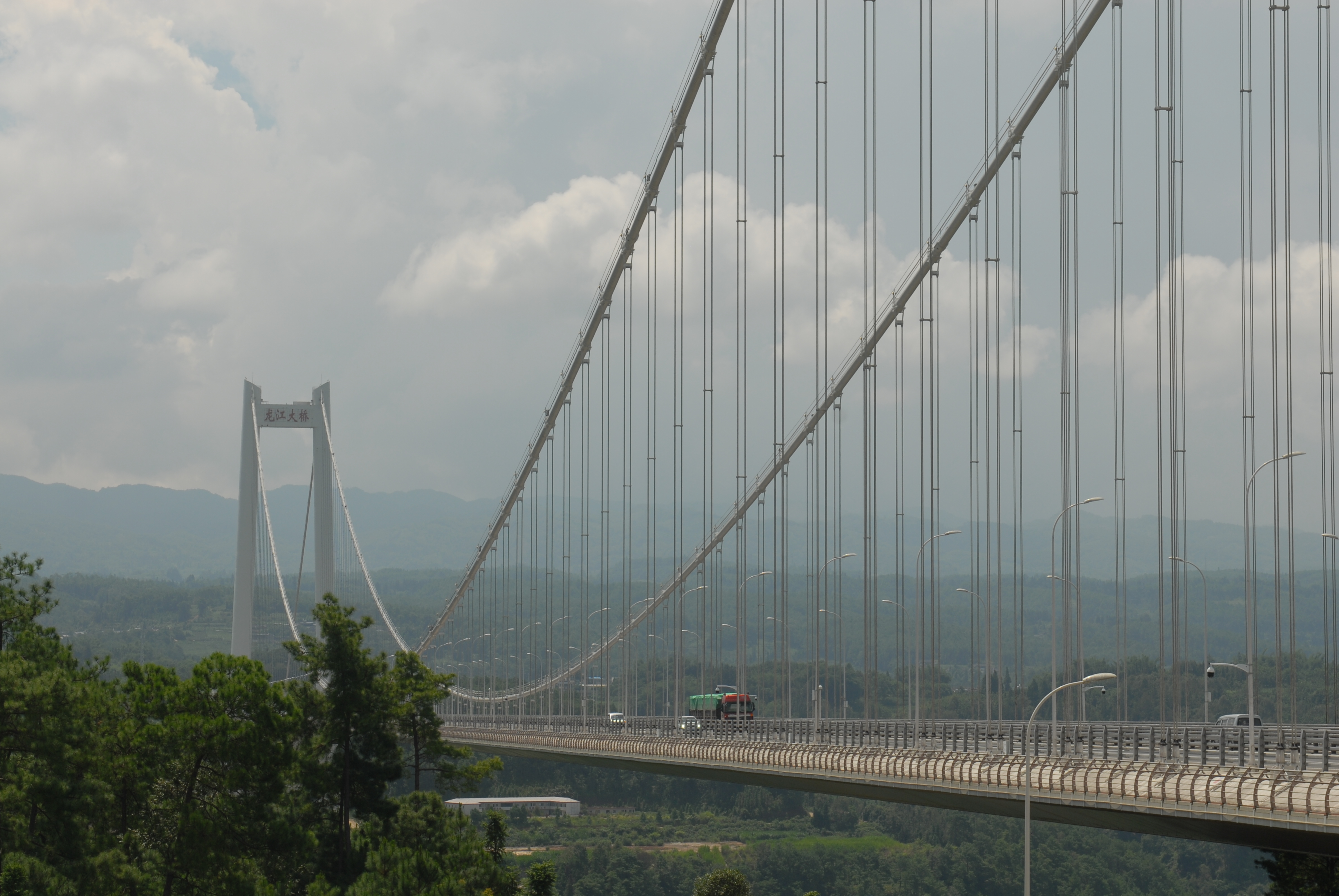 云南省保腾高速龙江特大桥